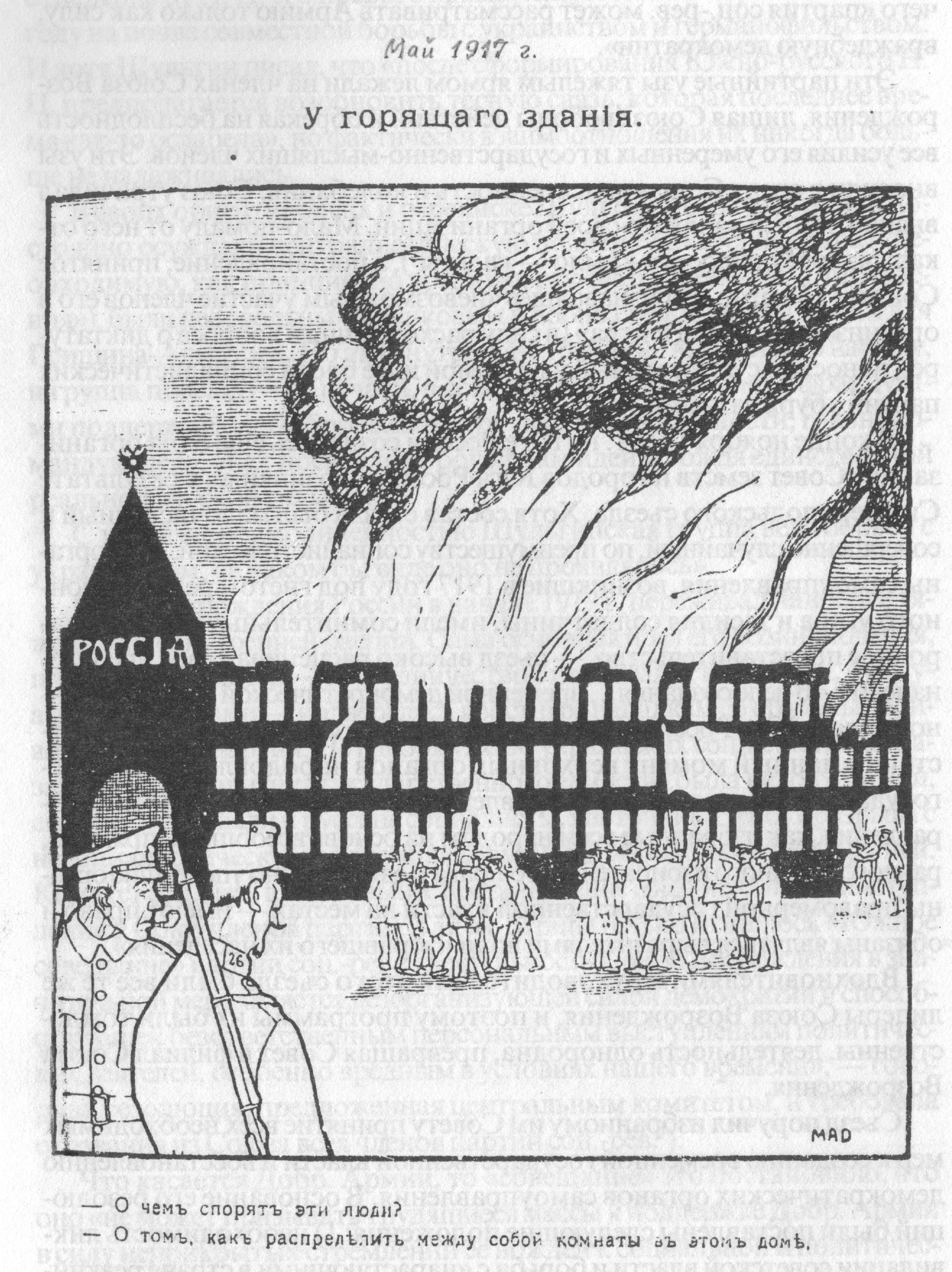 У горящаго здания [России]. Рисунок из одесского журнала времён Первой мировой войны (Российская республика), май 1917. Англичанин - французу: - О чём спорят эти люди [под разными флагами]? - О том, как распределить между собой комнаты в этом [горящем] доме.